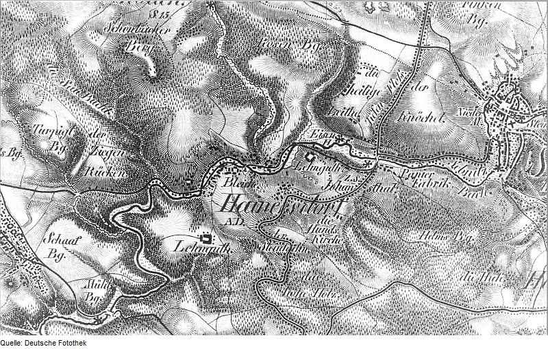 Original image description from the Deutsche Fotothek Sebnitz-Hainersdorf. Oberreit, Sect. Stolpen, 1821/22